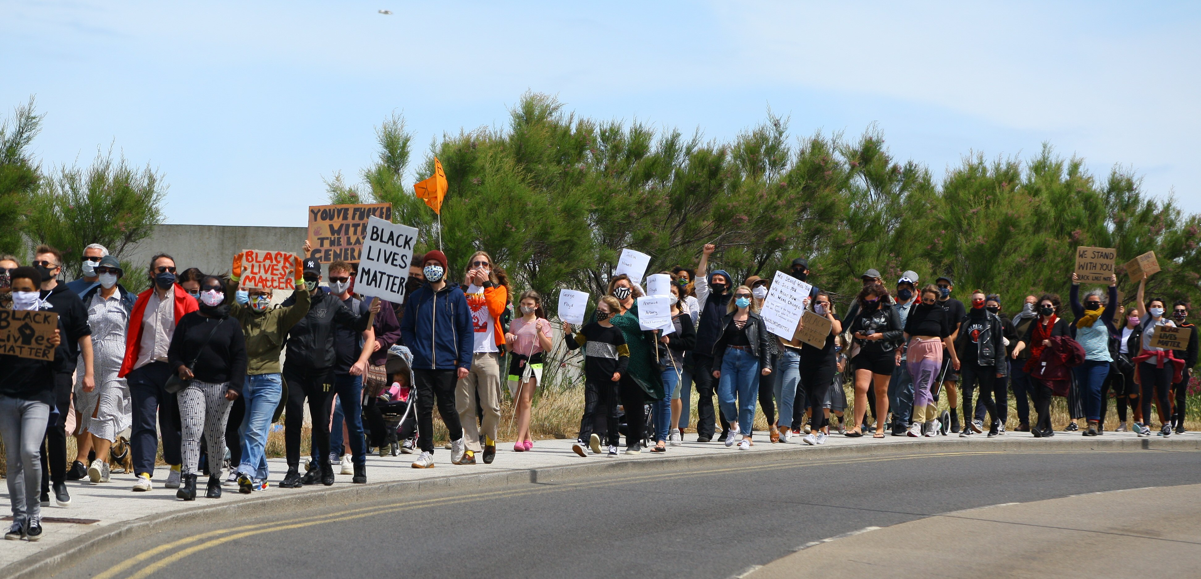 Black Lives Matter march, Margate 7 June 2020